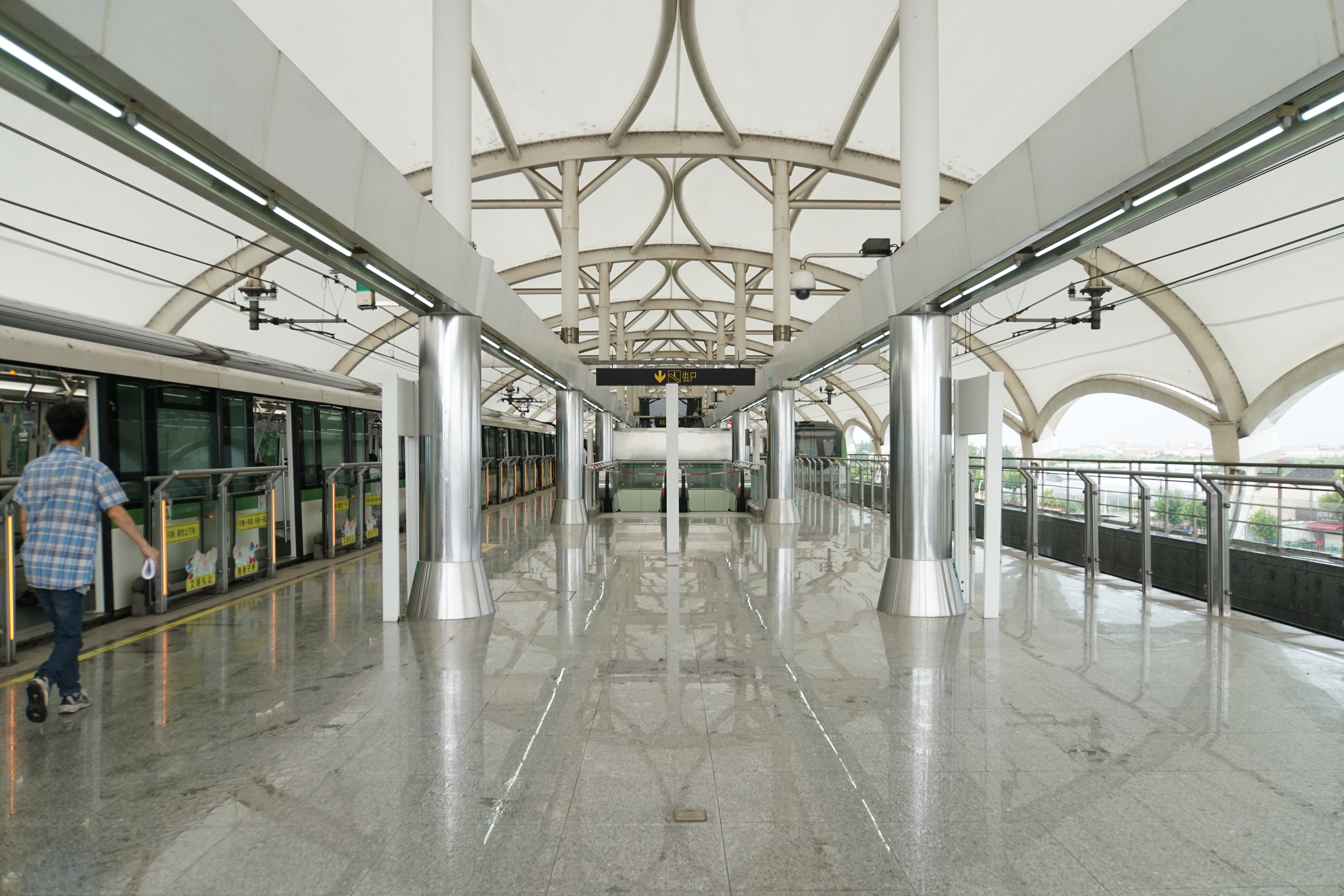 远东大道站台